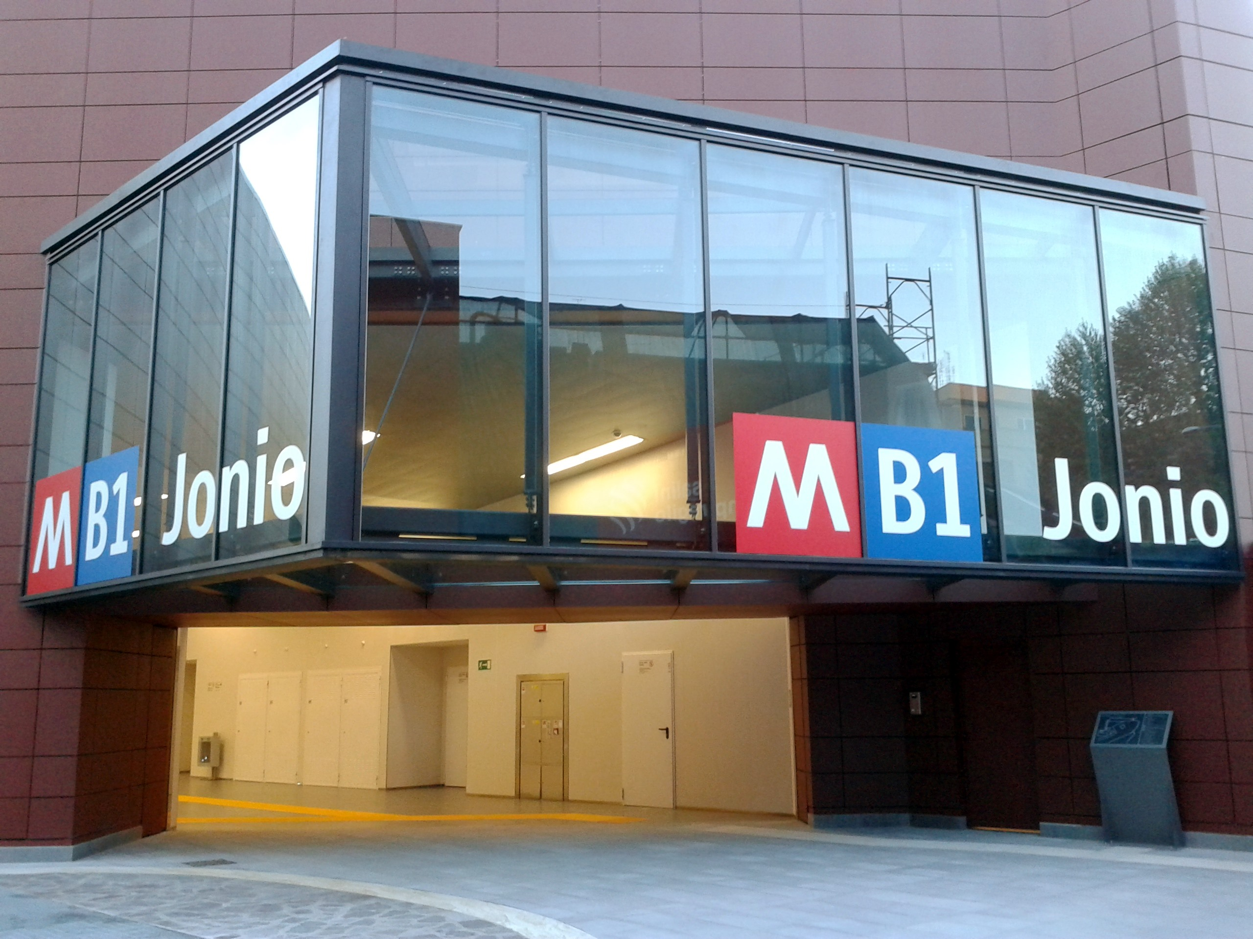 Ingresso della stazione Jonio, capolinea della linea B della metropolitana di Roma